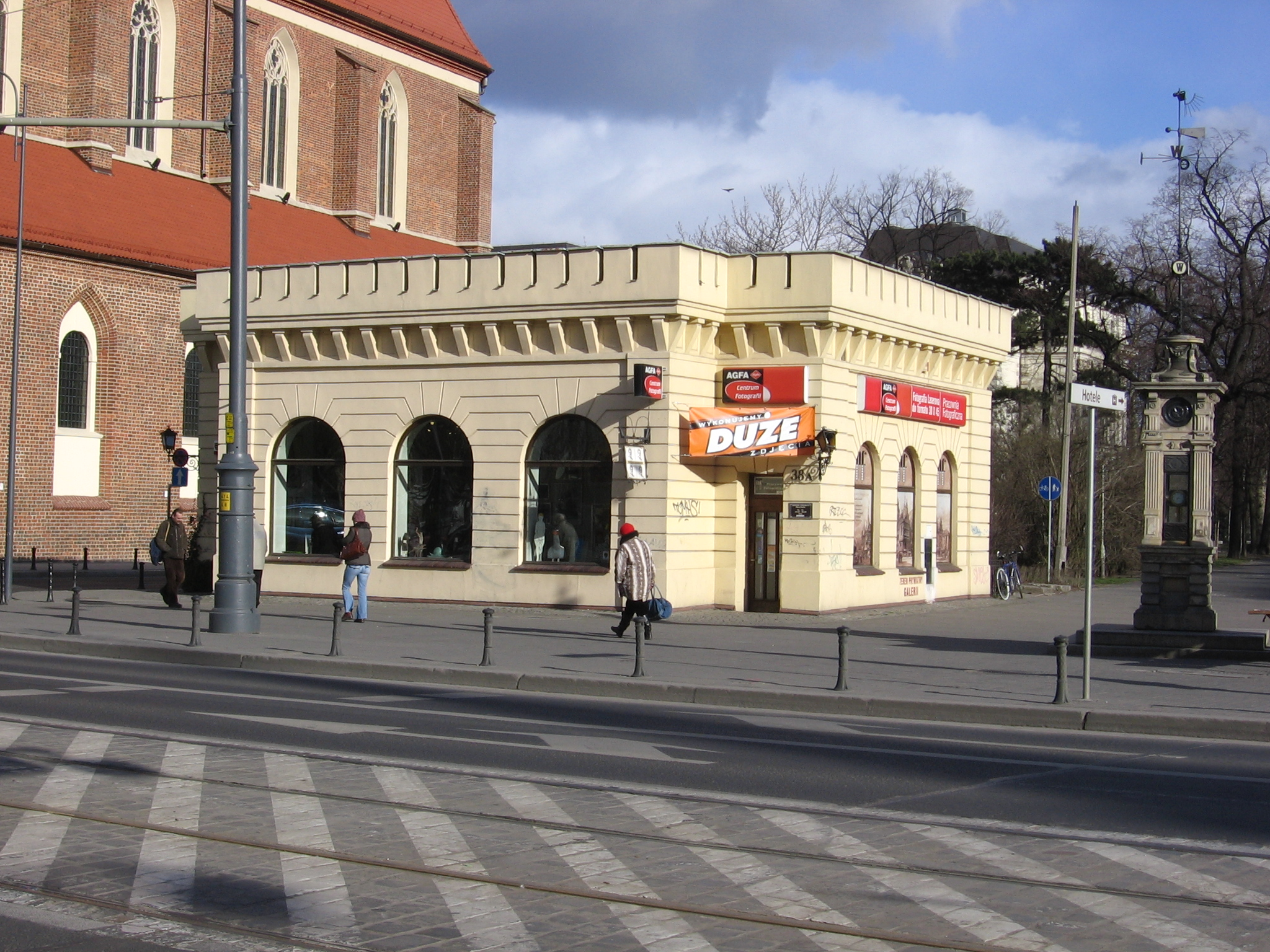 Dawny budynek odwachu (dziś - budynek usługowy i galeria sztuki) obok kościoła Bożego Ciała (po lewej) przy ul. Świdnickiej we Wrocławiu; na prawo od budynku - wieżyczka z instrumentami meteorologicznymi